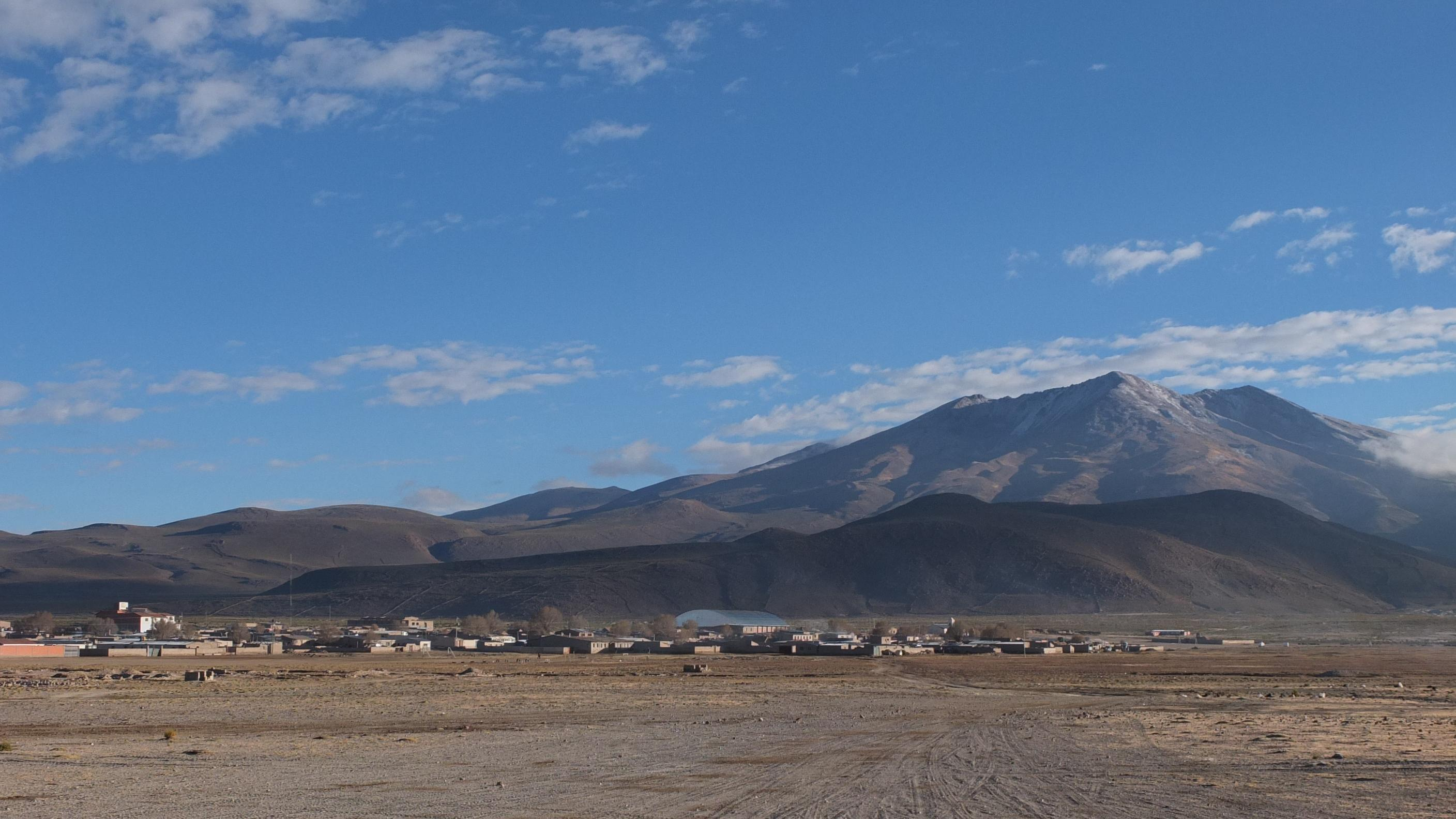 San Juan, Departamento Potosí, Bolivia. 2013